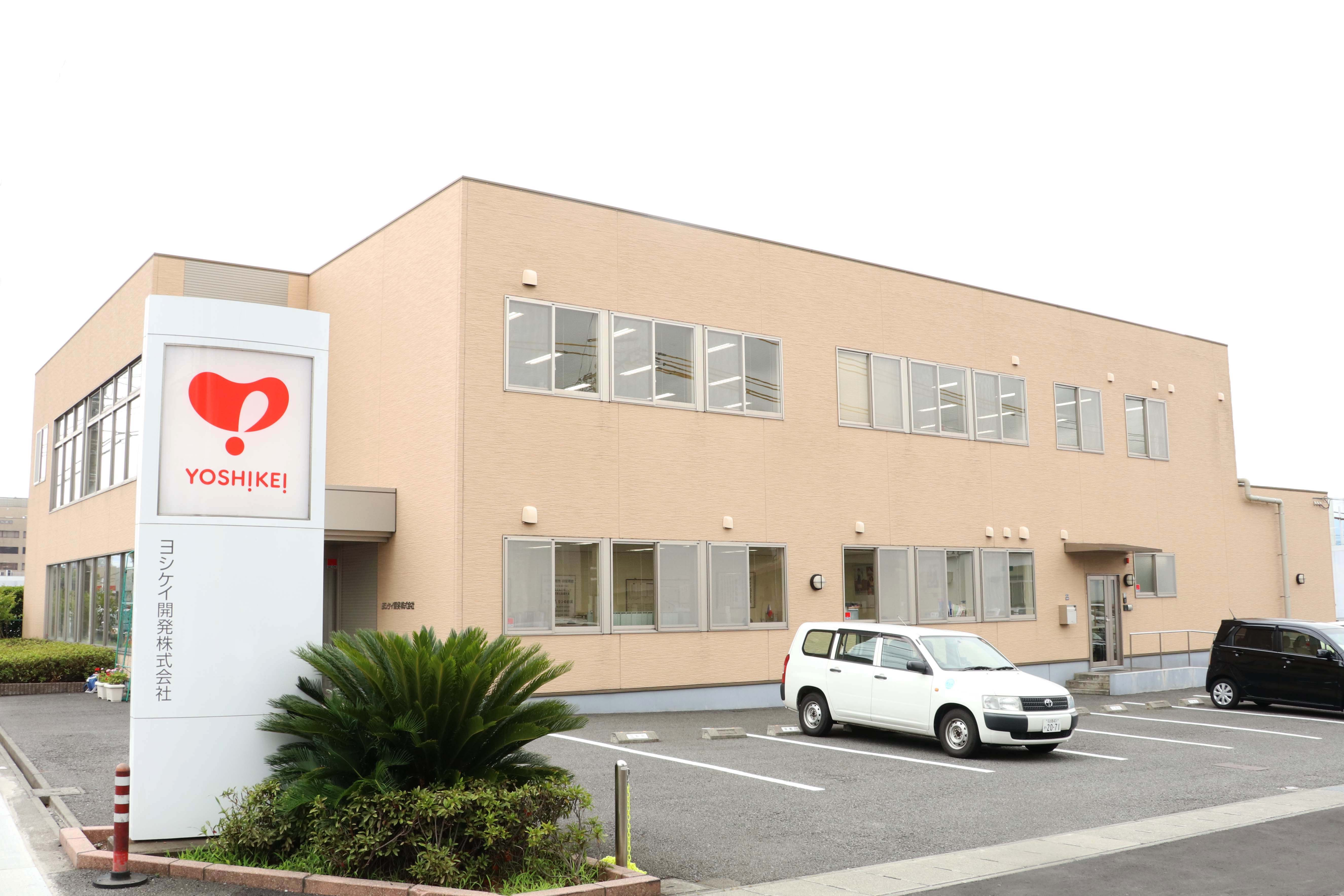 ヨシケイ開発株式会社本社画像